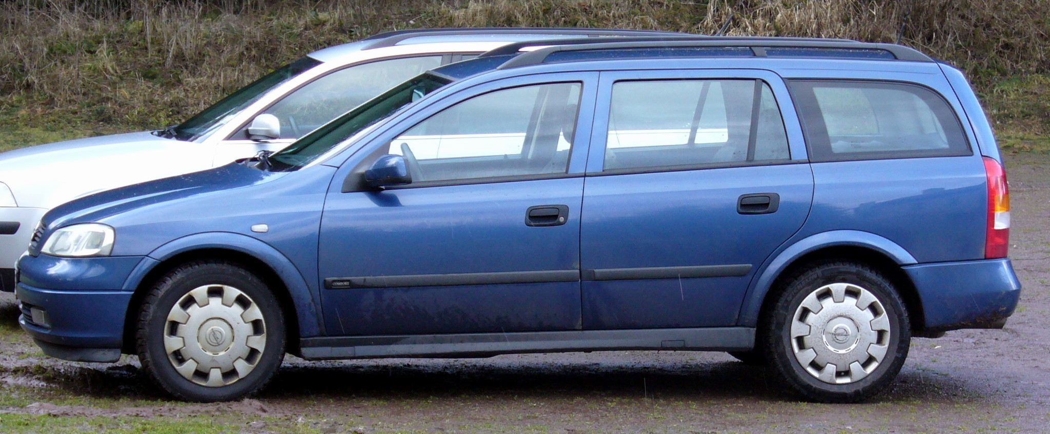 Opel Astra G Caravan